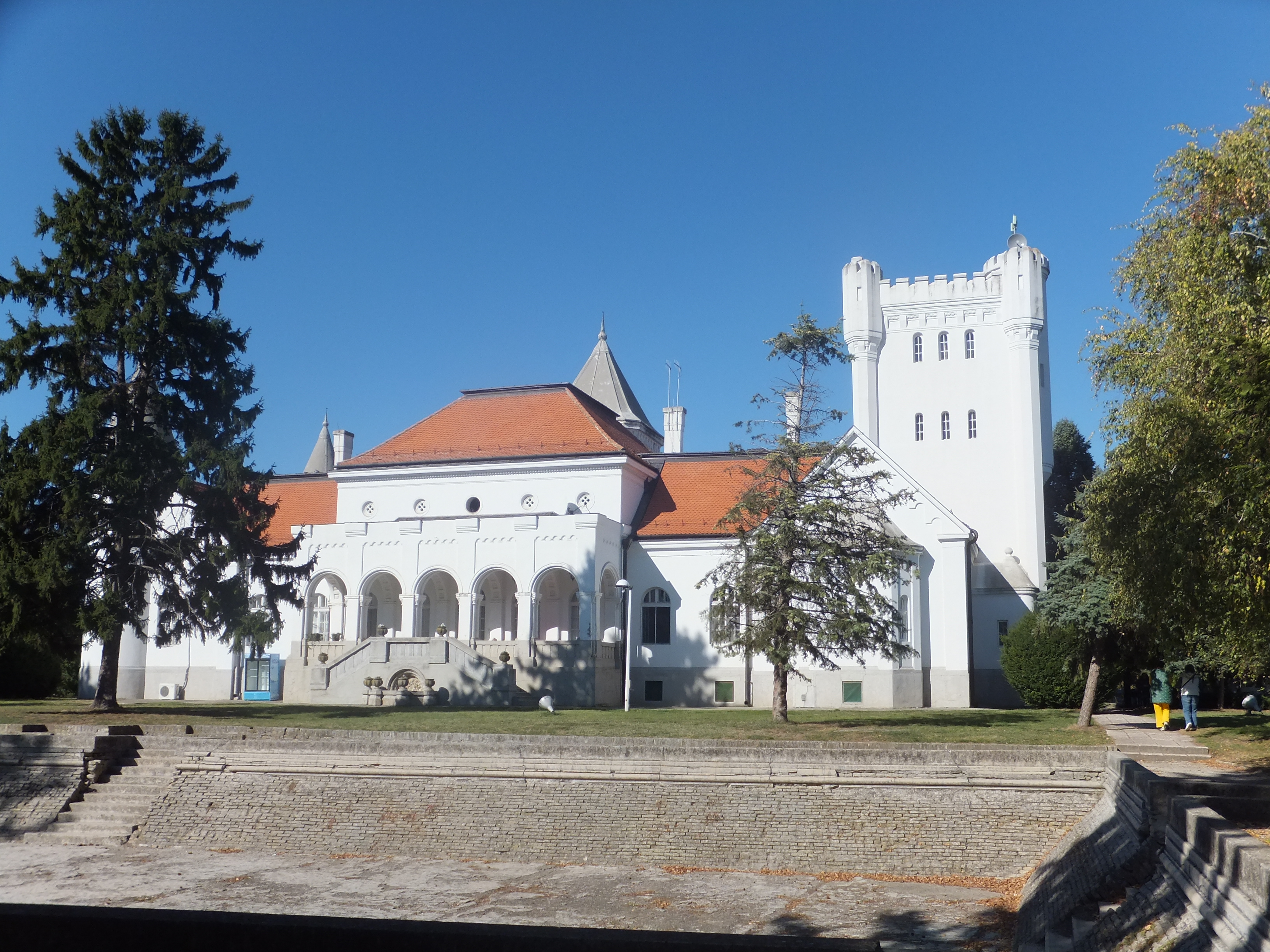 Дворац Фантаст у атару Бечеја